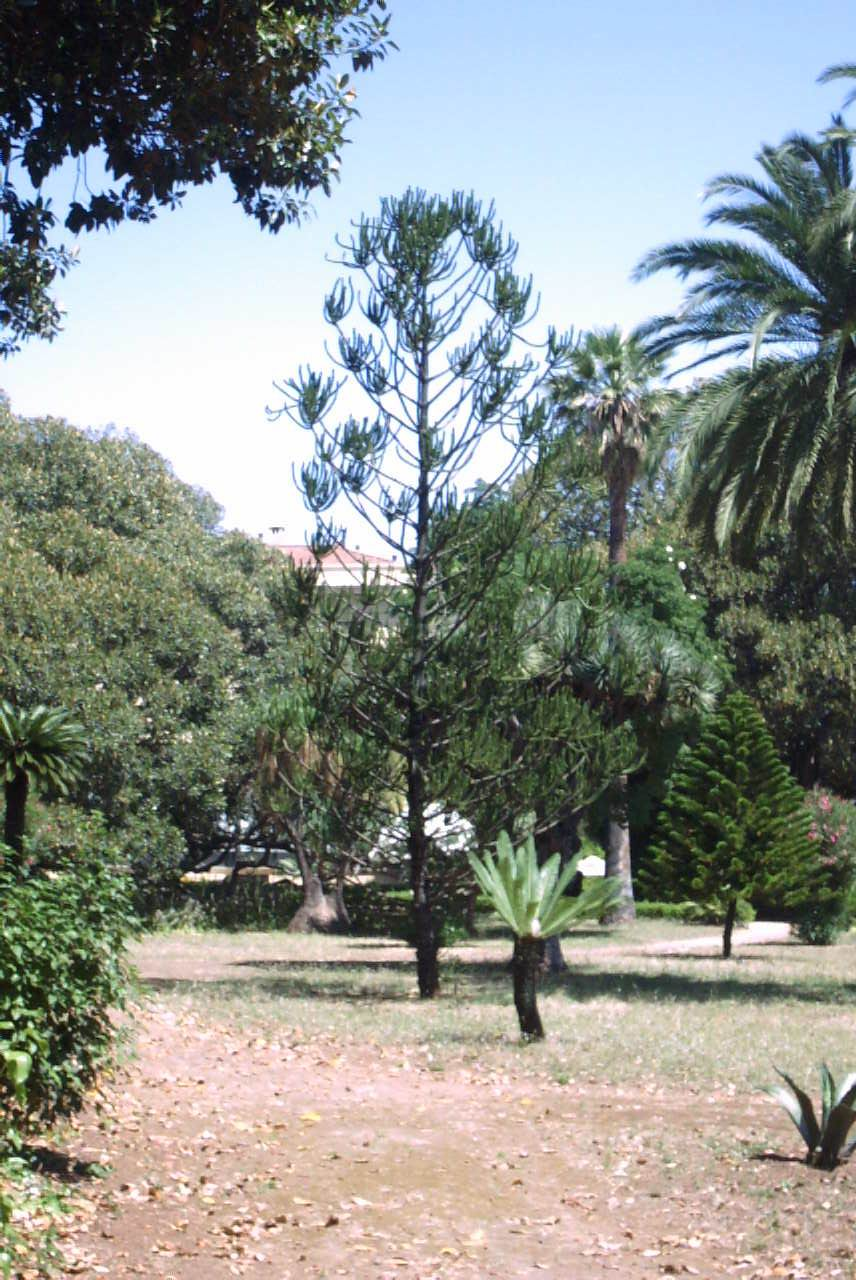 Villa Malfitano (Palermo)